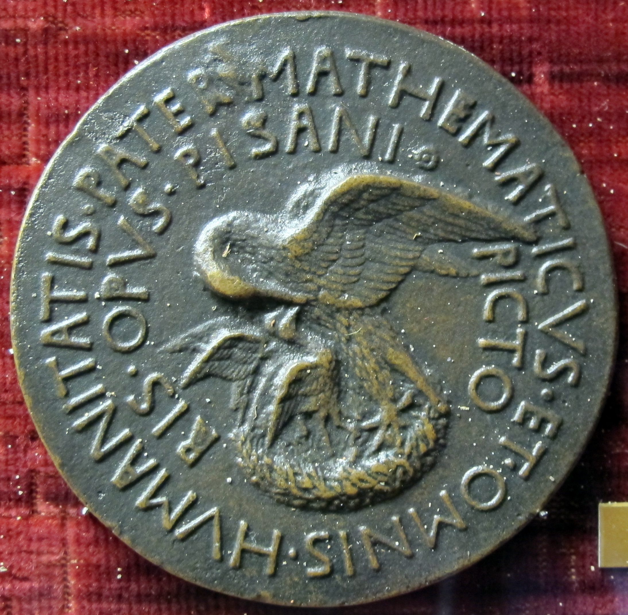 Pisanello, medaglia di vittorino da feltre, verso con pellicano